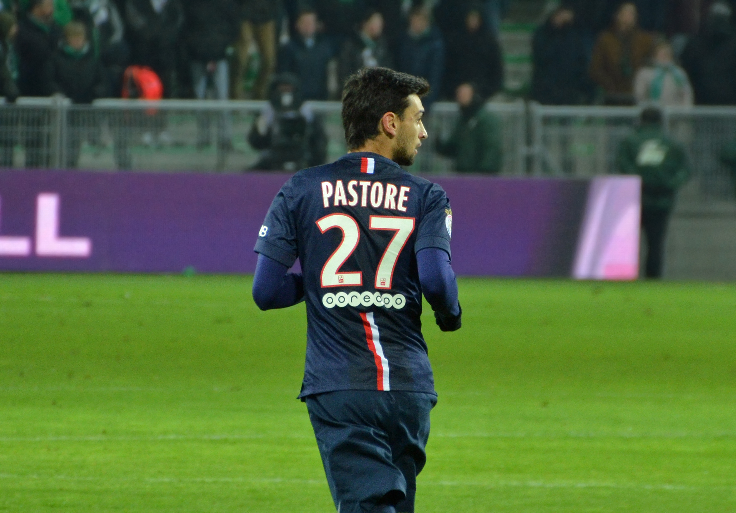 Javier Pastore au stade Geoffroy Guichard durant le match Saint Etienne - Paris SG le 25 janvier 2015.